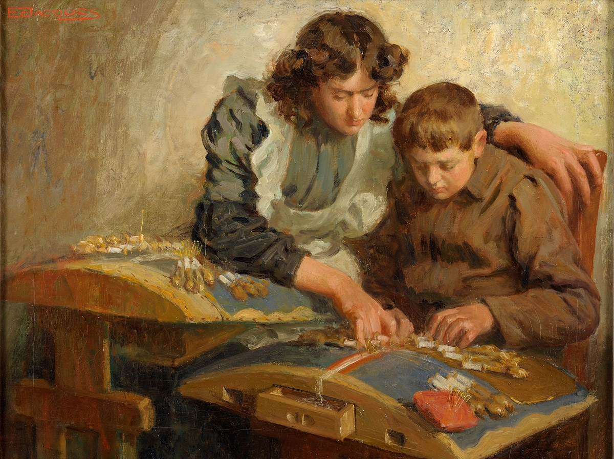 Die Spitzenklöppler. Signiert. Öl/Lwd., 48 x 62 cm